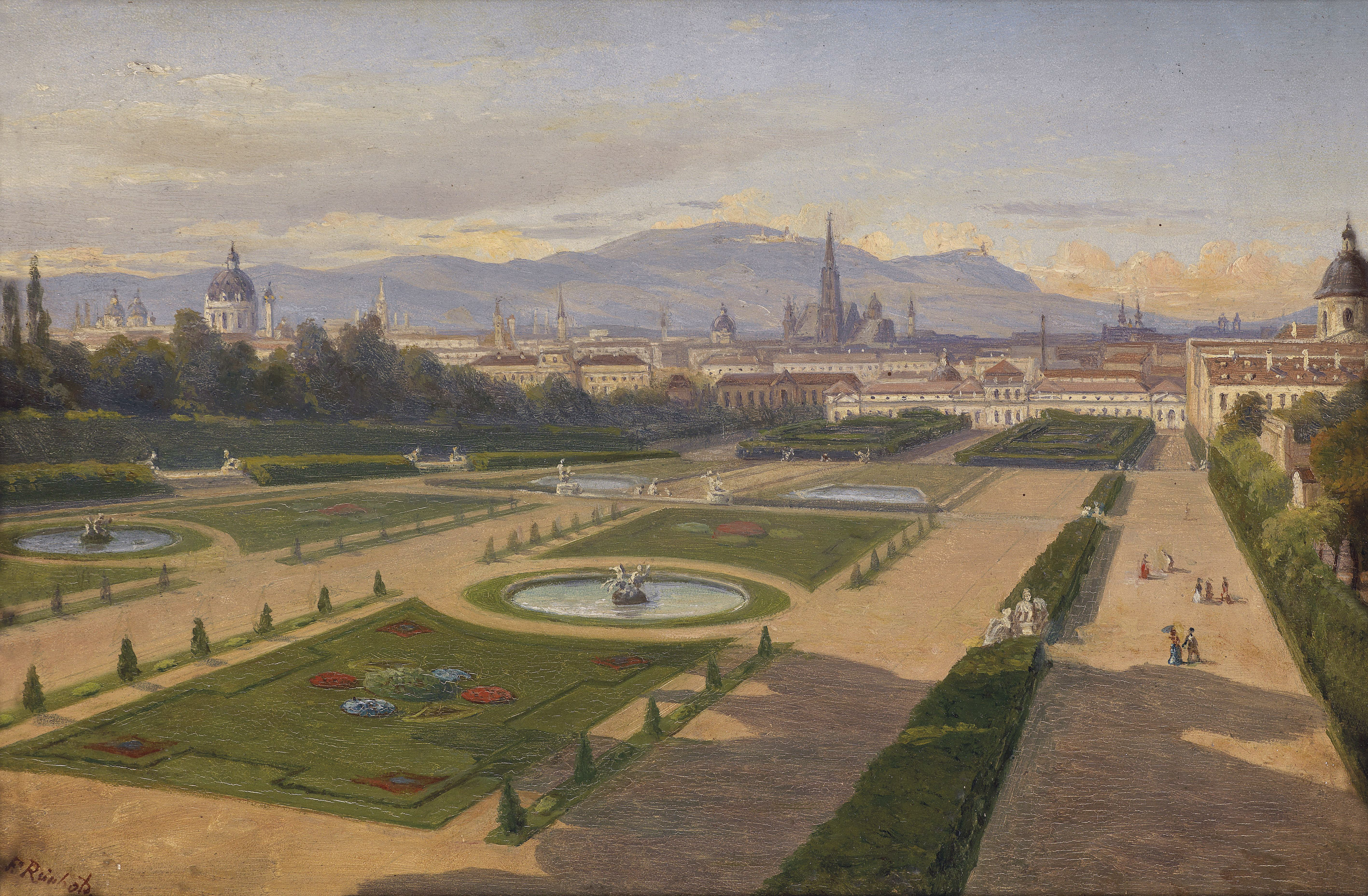 Blick vom Garten des Belvedere gegen Wien, den Kahlen- und den Leopoldsberg